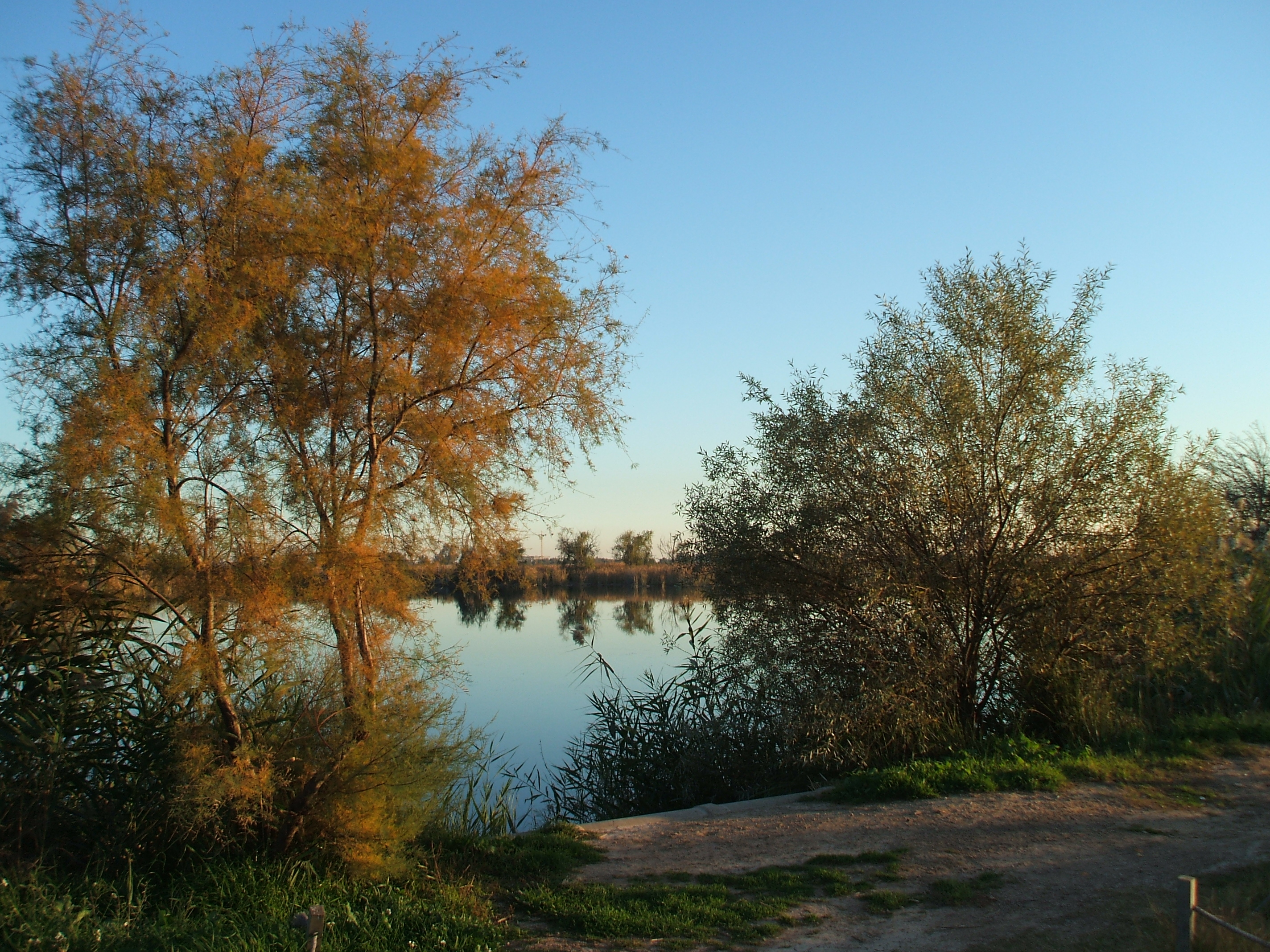 Vista de la marjal de Almenara